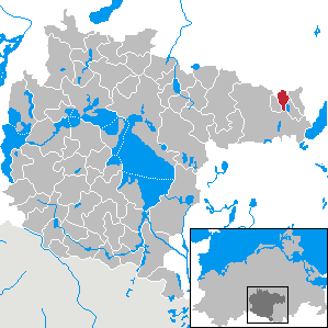 Lapitze im Landkreis Müritz, Mecklenburg-Vorpommern